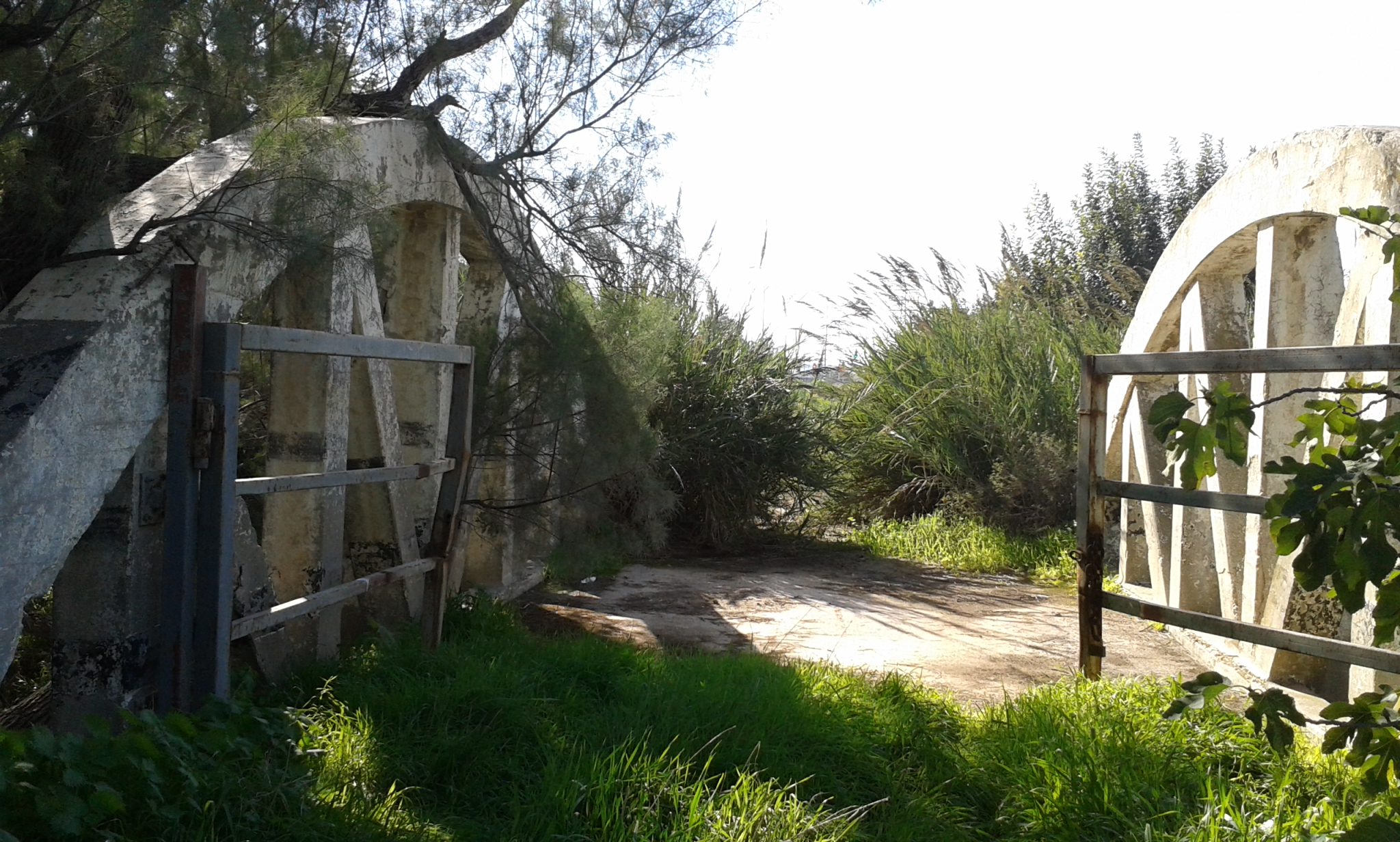 גשר הקשתות מעל נחל לכיש